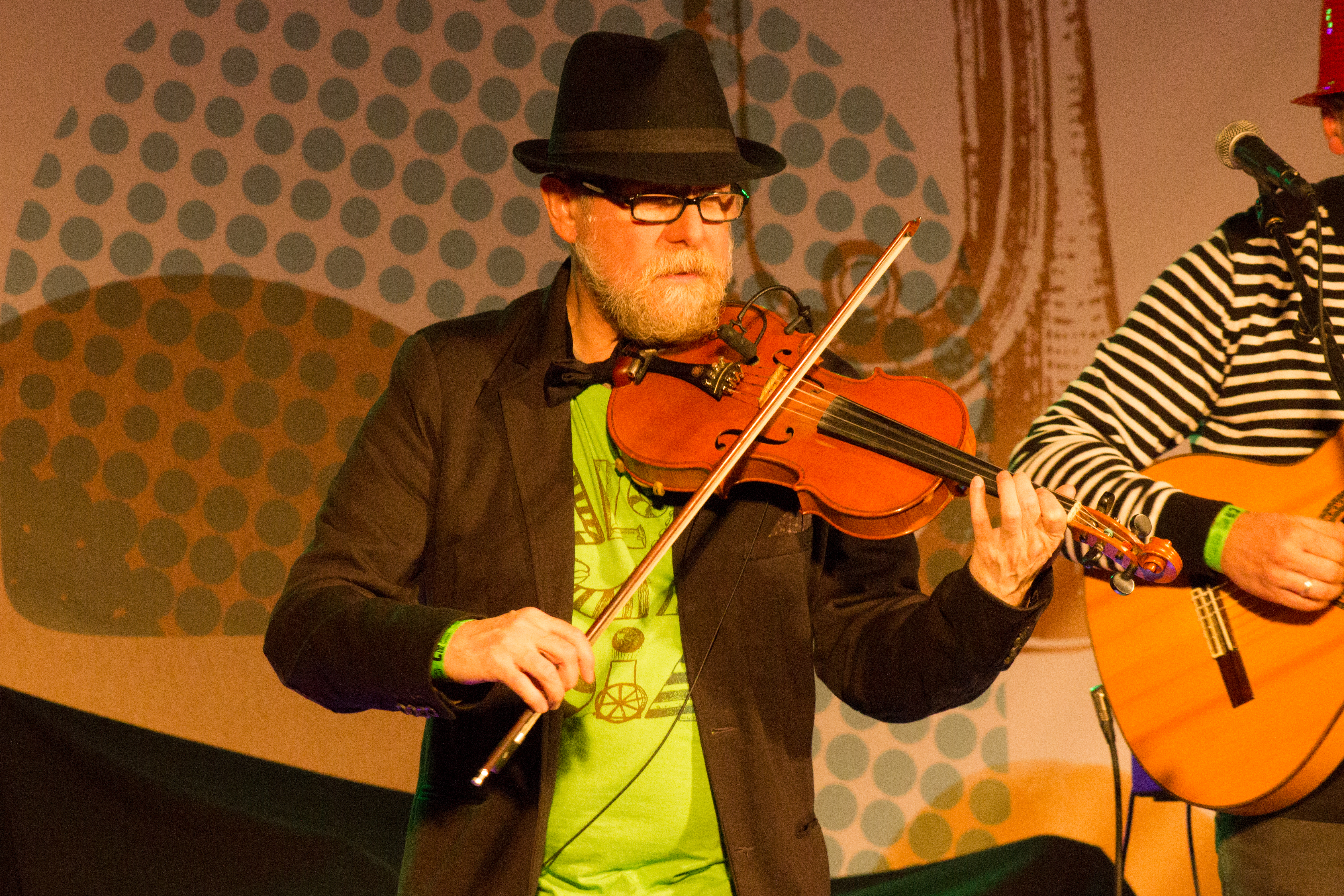 O músico Quim Farinha no Culturgal 2016.